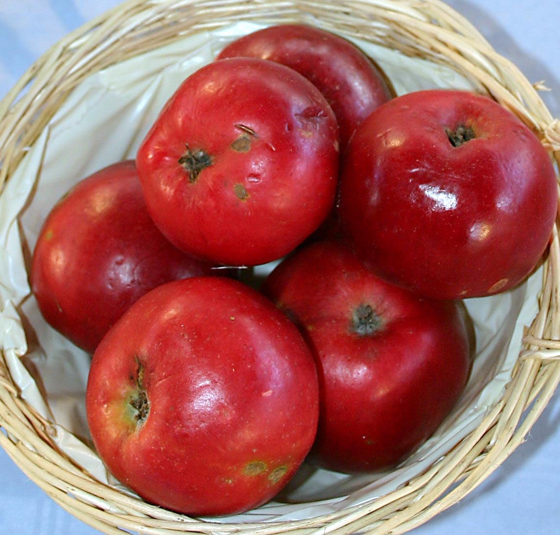 Malus "Danziger Kantapfel" (Büdingen)